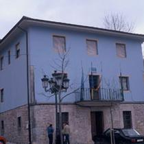 Ayuntamiento de Cabrales